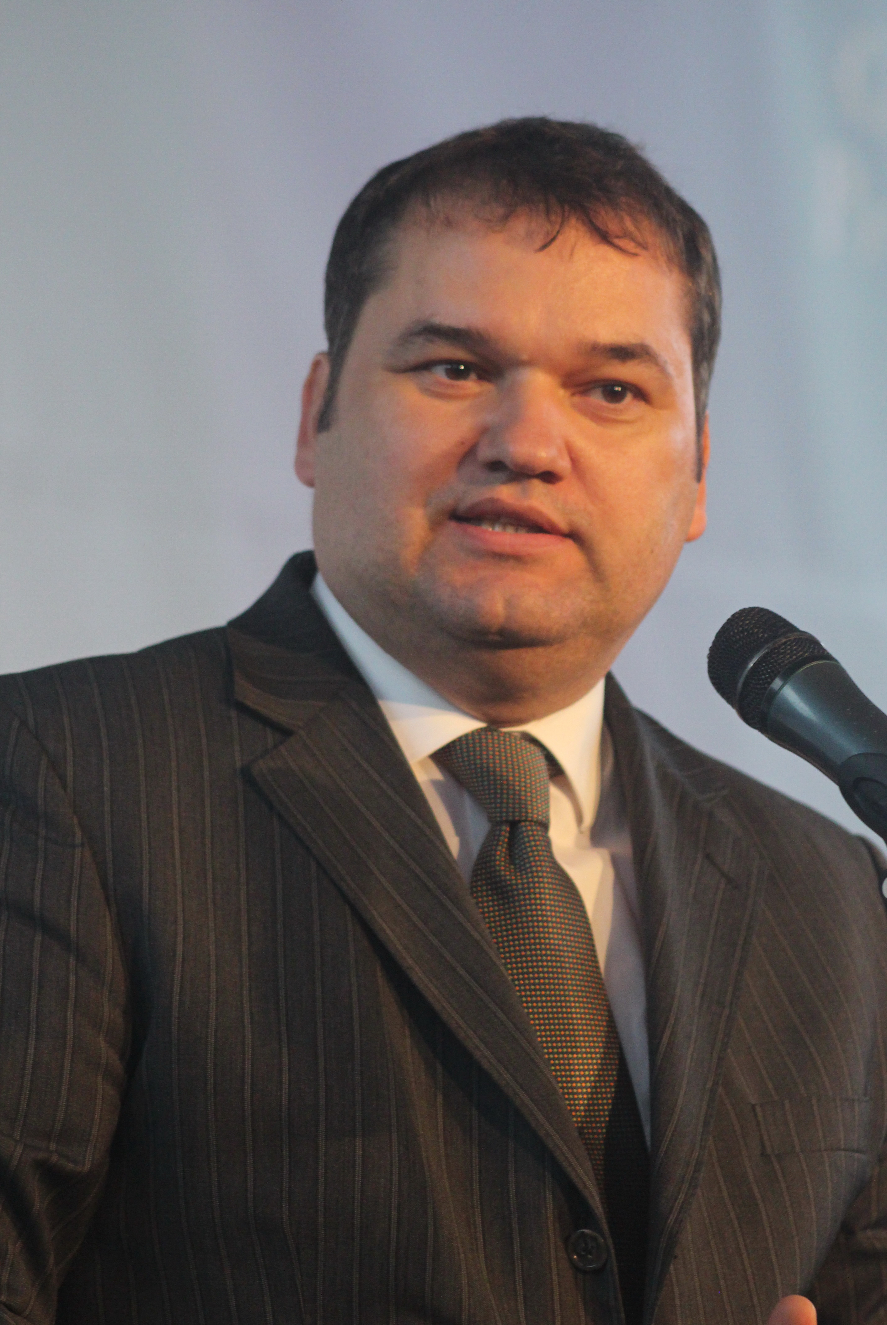 Cseke Attila